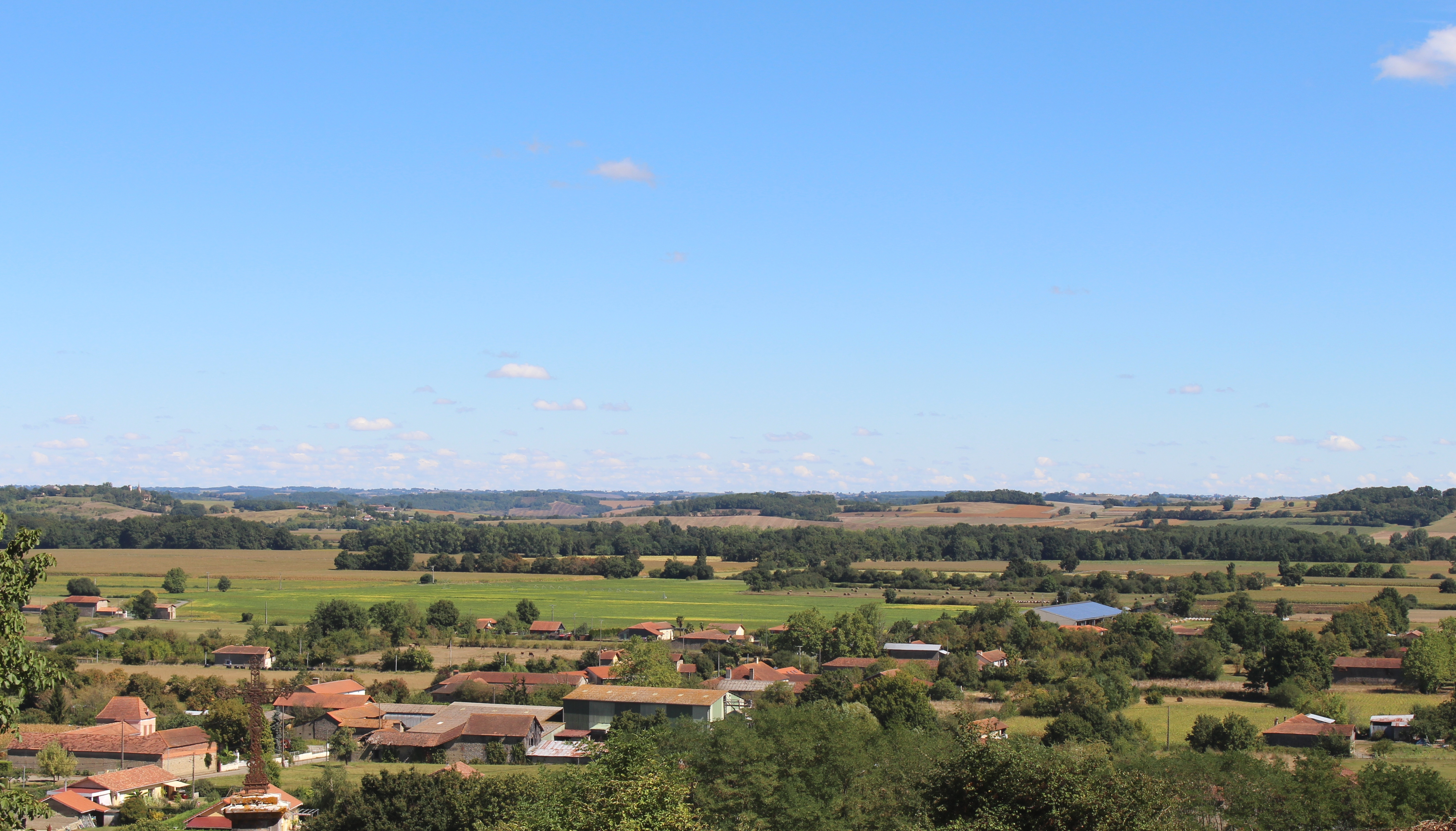 Lafitole (Hautes-Pyrénées)